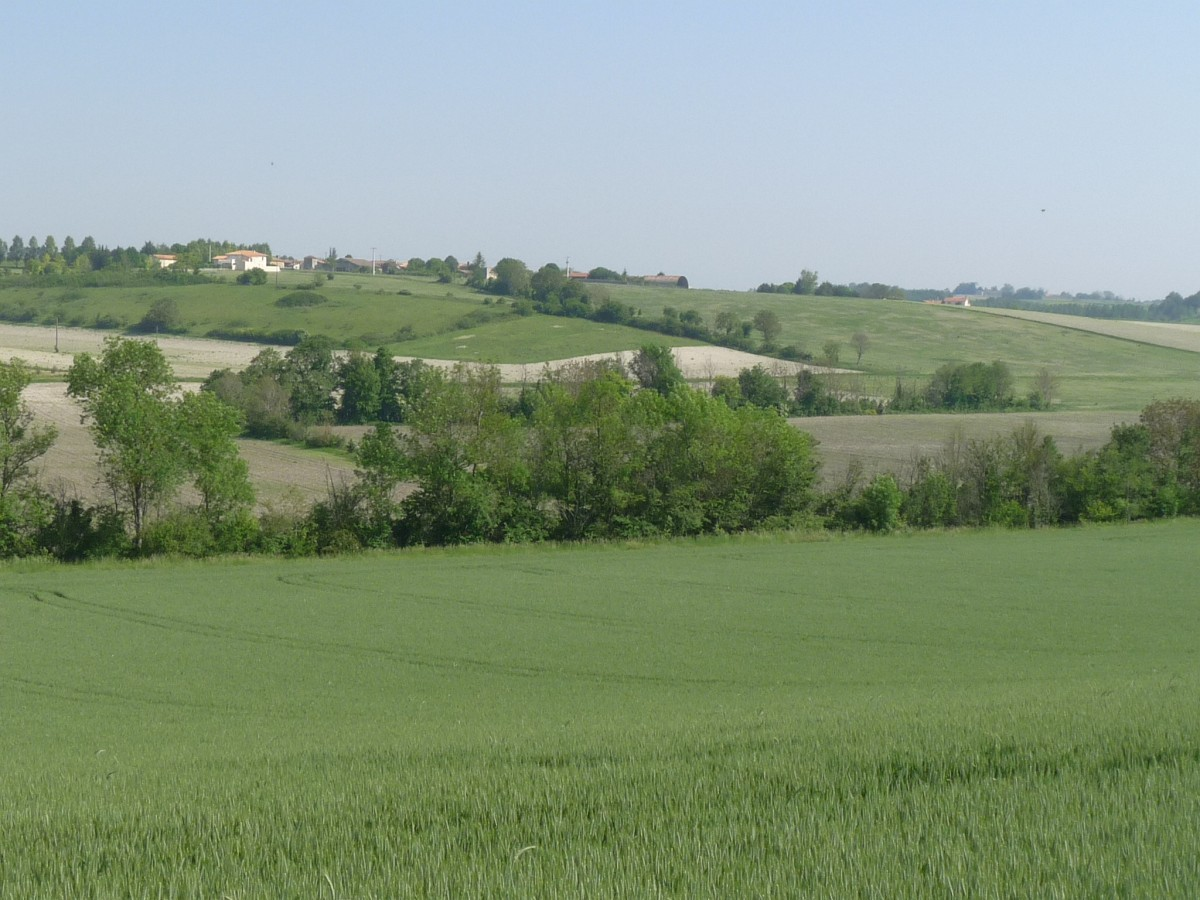 Vallée de l'Ecly, vue de la D.124 à Aubeville (Charente, France)